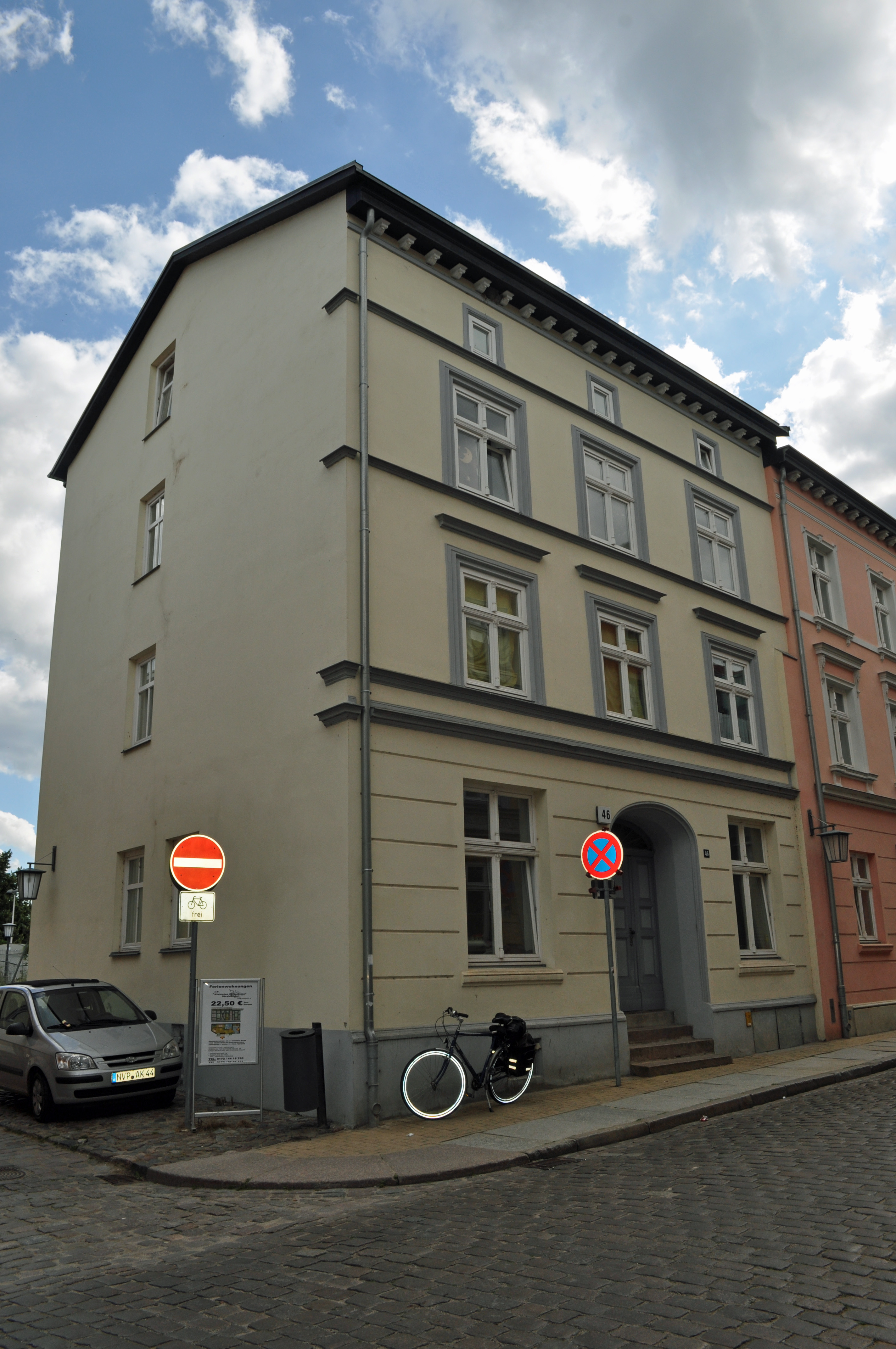 Das Foto zeigt ein Haus (bzw. Details des Hauses) in der Frankenstraße in Stralsund, Deutschland. Die Hausnummer steht im Dateinamen. Aufgenommen am 19. Juli 2011 vom Benutzer:Klugschnacker.